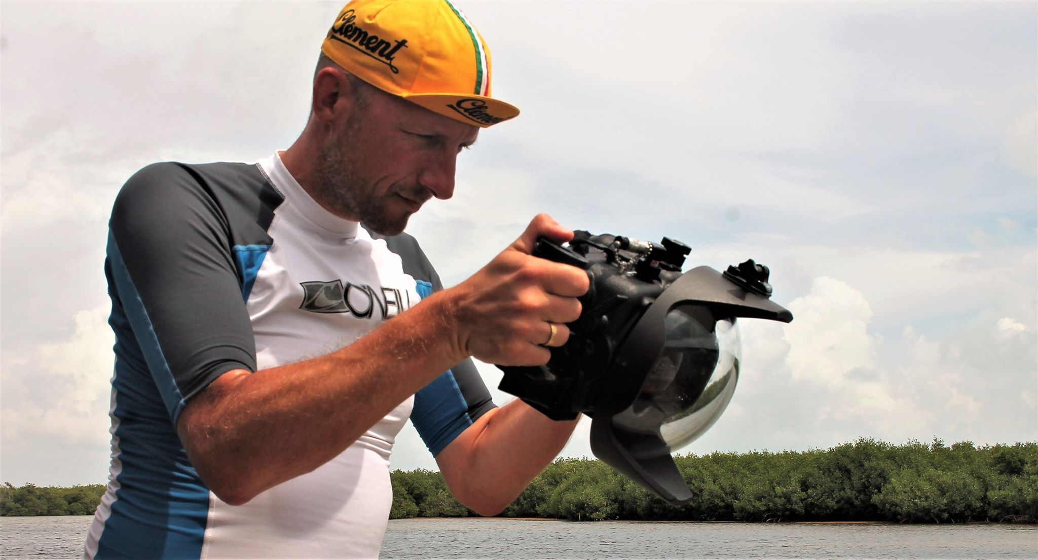 Christian Kemper, deutscher TV-Journalist und Buchautor